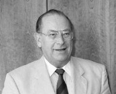 28.8.1990 Der Bundesminister für Verkehr (BMV), Dr. Friedrich Zimmermann (links), empfängt den Präsidenten des Zentralverbandes des Deutschen Kraftfahrzeugverbandes (ZDK), Bernhard Enning, anläßlich der Eröffnung der Aktion Lichttest 1990 - im Bundesministerium für Verkehr